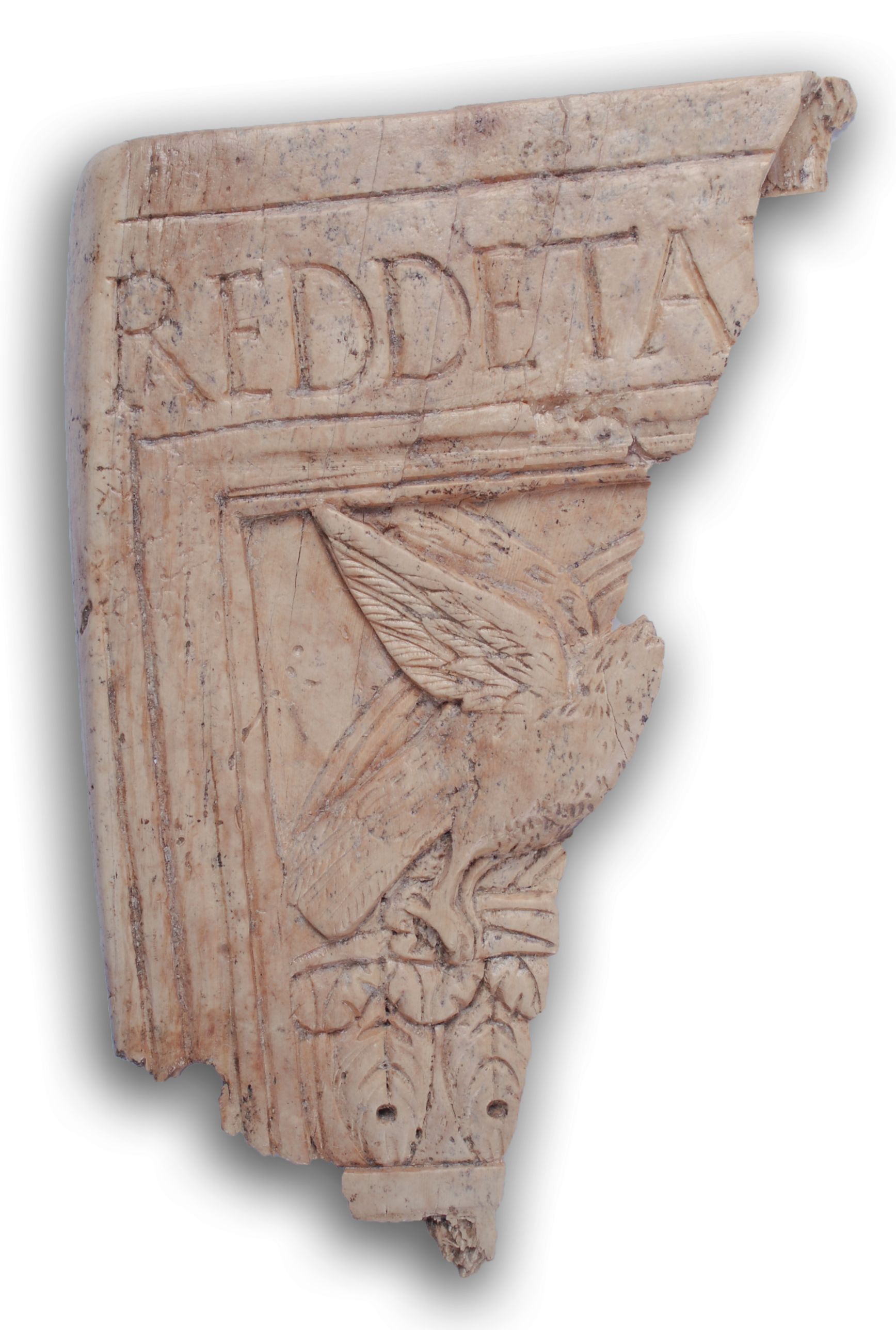 Srpski (latinica): Pločica od slonove kosti sa natpisom iz perioda 4-og veka. Pronađena je arheološkim iskopavanjima iz 2004. godine na Hisaru. Deo je zbirke Hisar u Narodnom muzeju u Leskovcu.